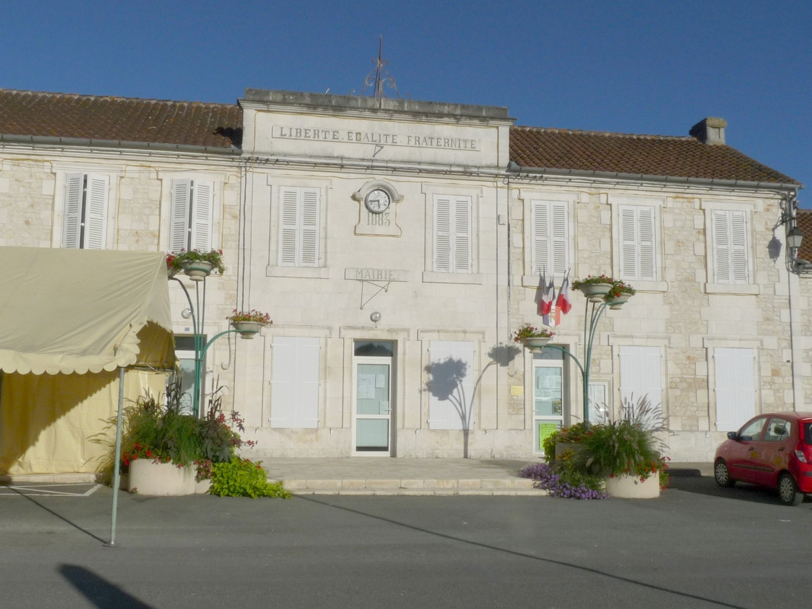 Mairie de Salignac, Charente-Maritime, France